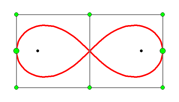 Рисунок показывает возможность точного воспроизведения Лемнискаты Бернулли посредством NURBS кривой. Зеленые кружки показывают положение контрольных точек. Серая линия - контрольная ломаная.